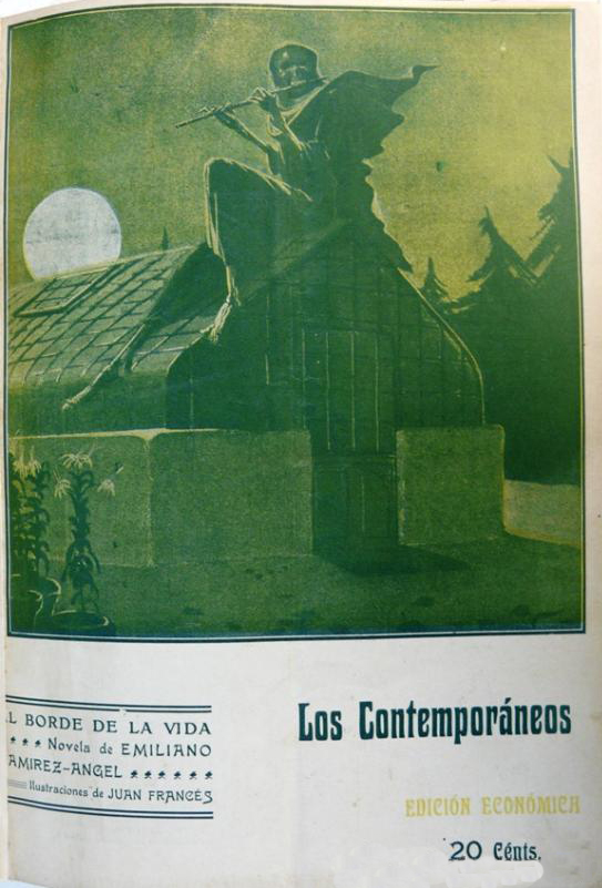 Portada de Al borde de la vida.